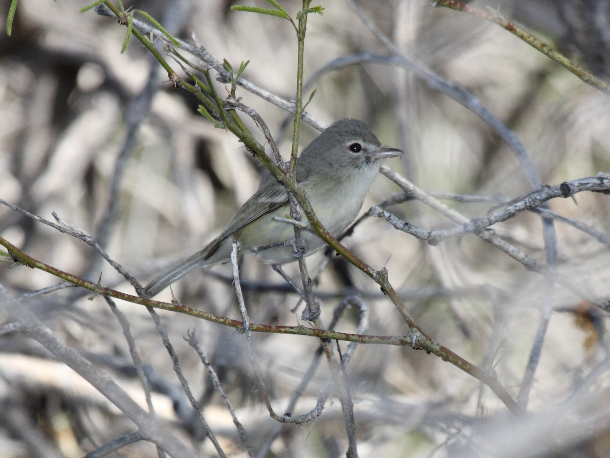 Bell's Vireo (Vireo bellii)